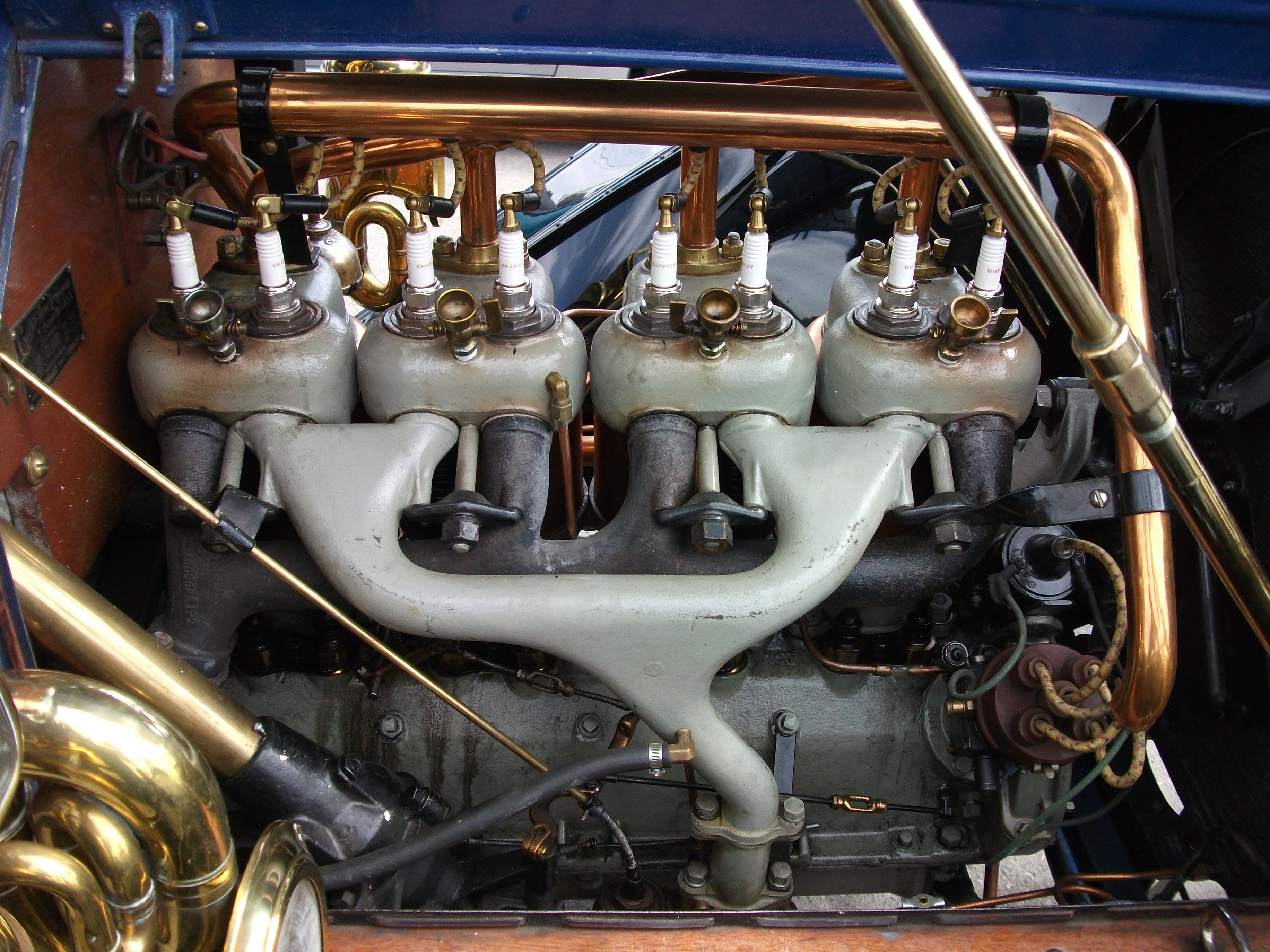 1911 Cadillac Type 30